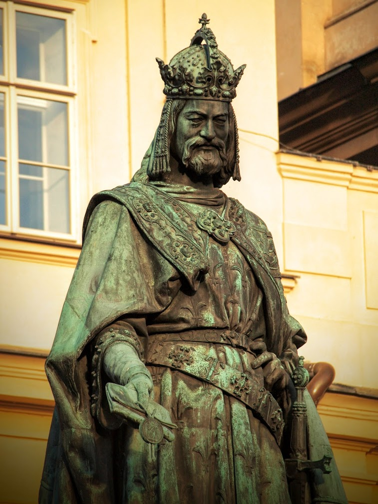 Socha Karla IV. na Křižovnickém náměstí